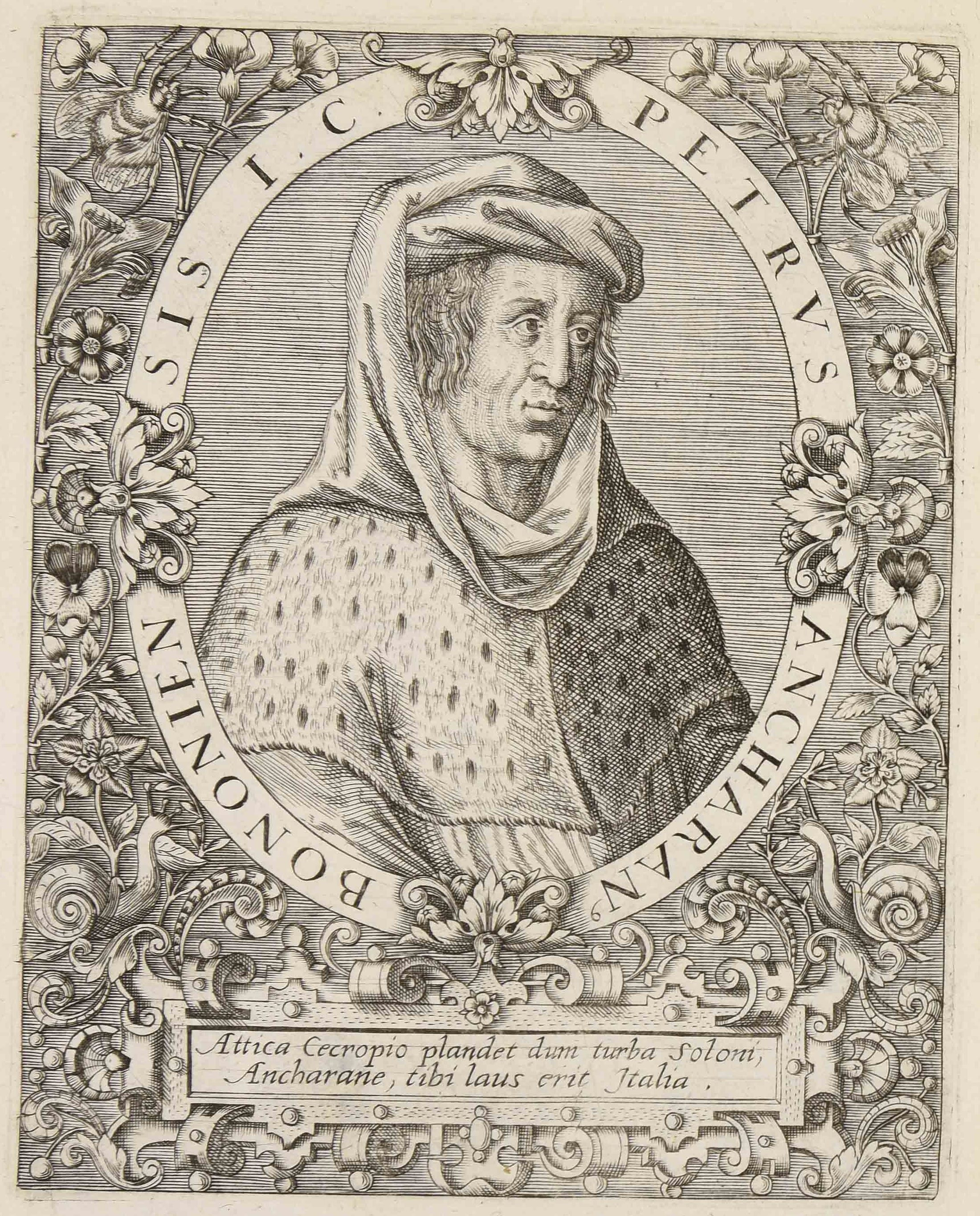 Calcografia in Jean Jacques Boissard, Bibliotheca sive Thesaurus virtutis, Frankfurt am Mein: William Fitzer 1627. Esemplare GI 1 v. c 41 della Biblioteca comunale di Trento, che presenta aggiunte successive.